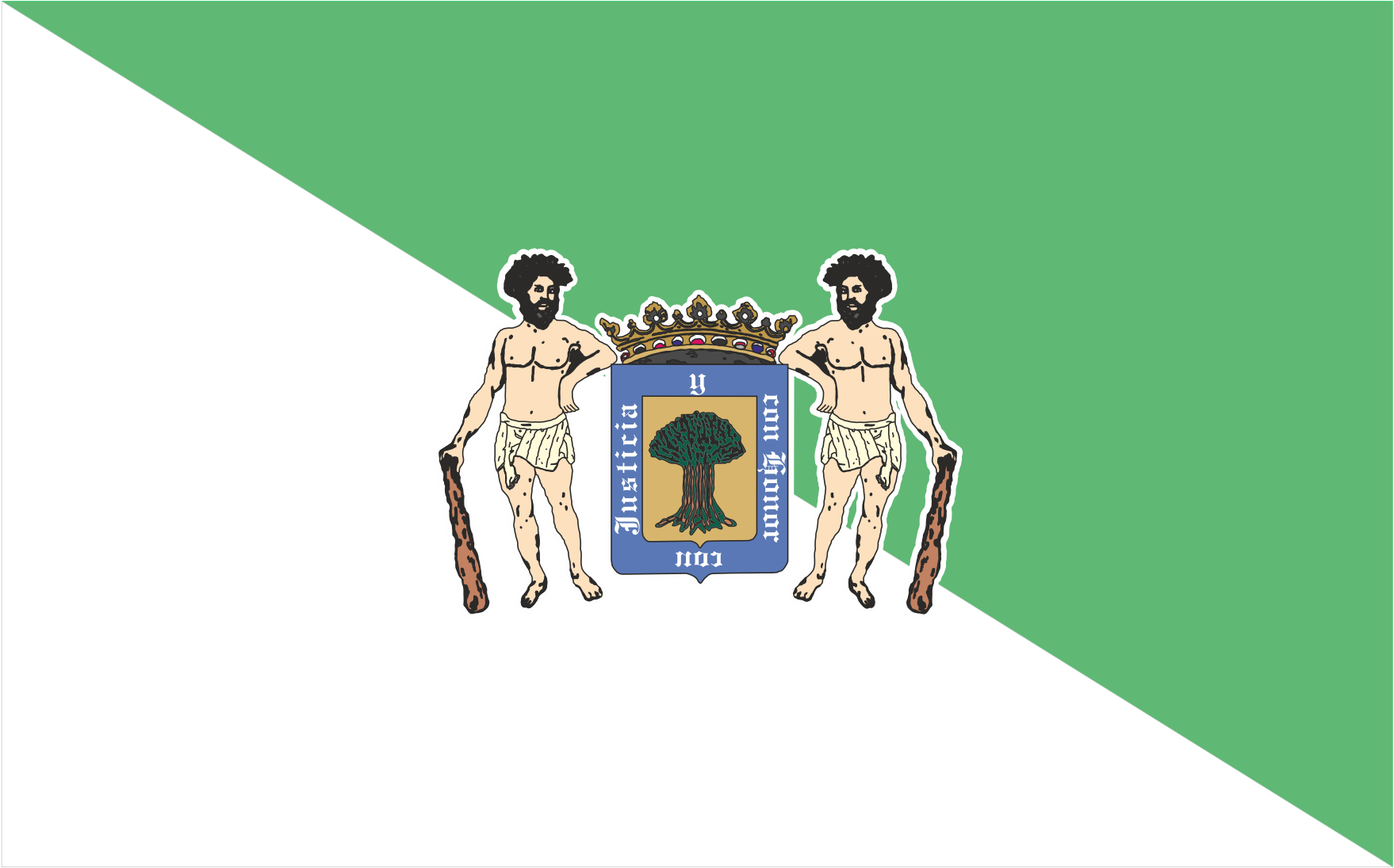 Dibujado a partir del oficial adoptado mediante decreto 3224/1973, de fecha 7 de diciembre (publicado en el BOE de 1 de enero de 1974)